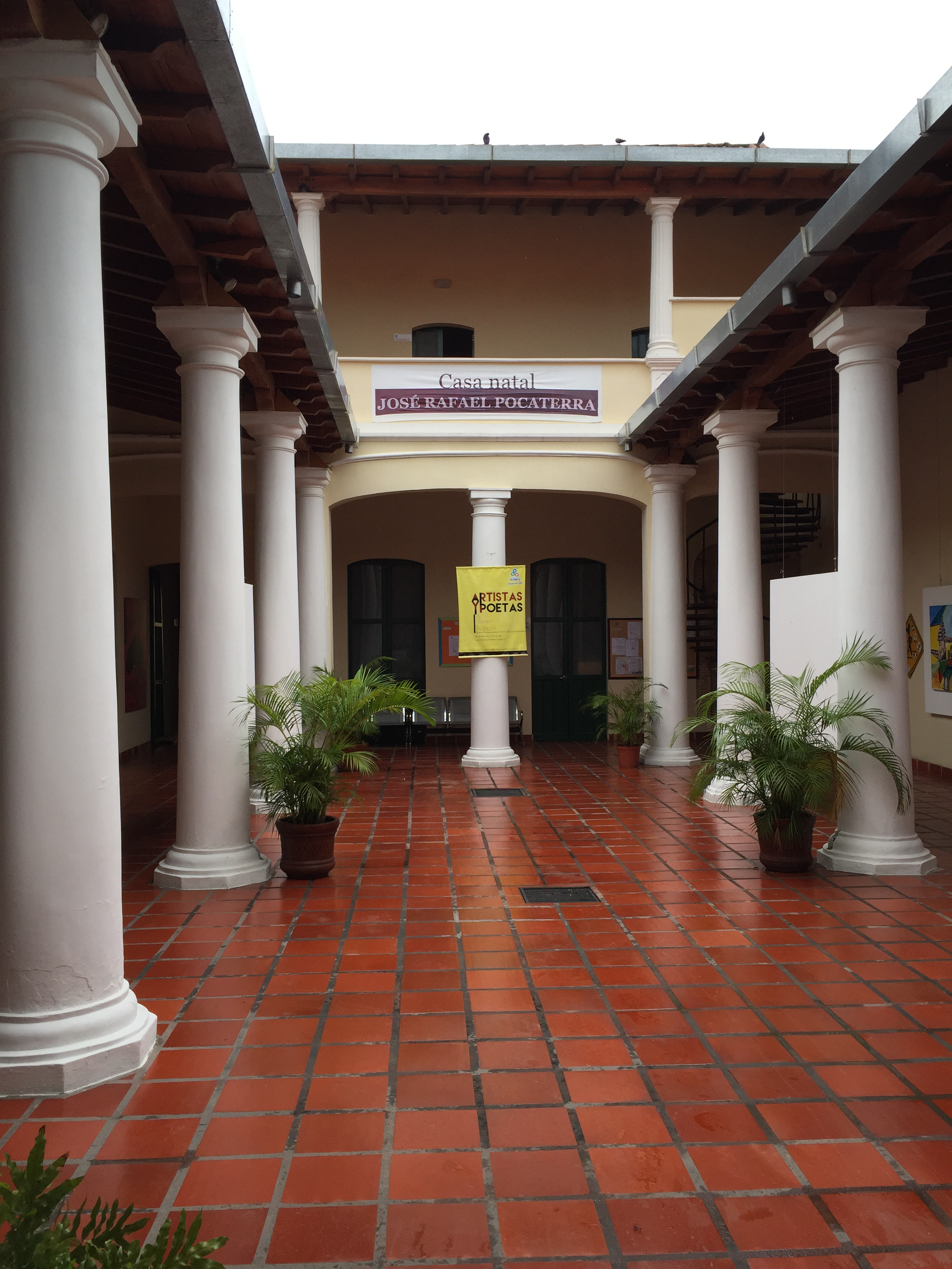 Casa Natal del escritor José Rafael Pocaterra en la ciudad de Valencia, Venezuela.